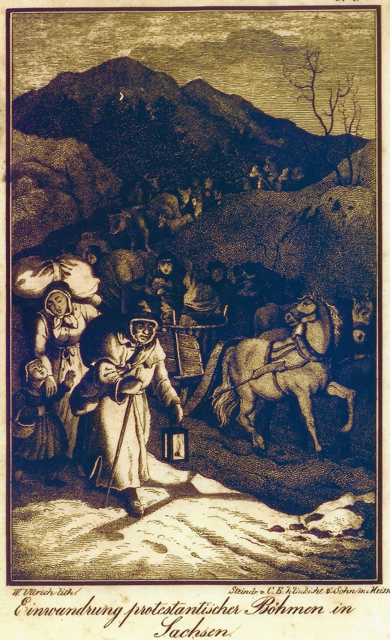 Exulanten fliehen 1653 nachts aus Platten ins protestantische Sachsen. 39 flüchtende Exulanten mit ihren Familien. Ludwig Richter fertigte diese Grafik 1834.